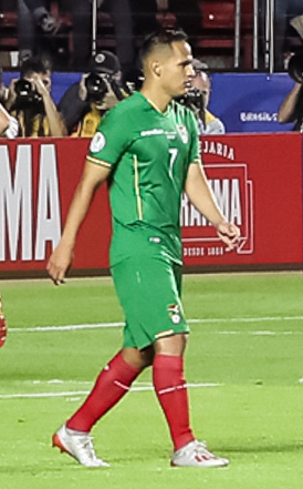 (São Paulo - SP, 14/06/2019) Celebração do gol da seleção Brasileira de Futebol. Foto: Marcos Corrêa/PR